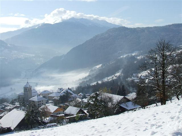 Vue de Marthod sous la neige